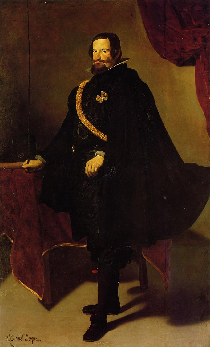 Retrato de Gaspar de Guzmán y Pimentel (1587-1645), conde-duque de Olivares y valido del rey Felipe IV de España.